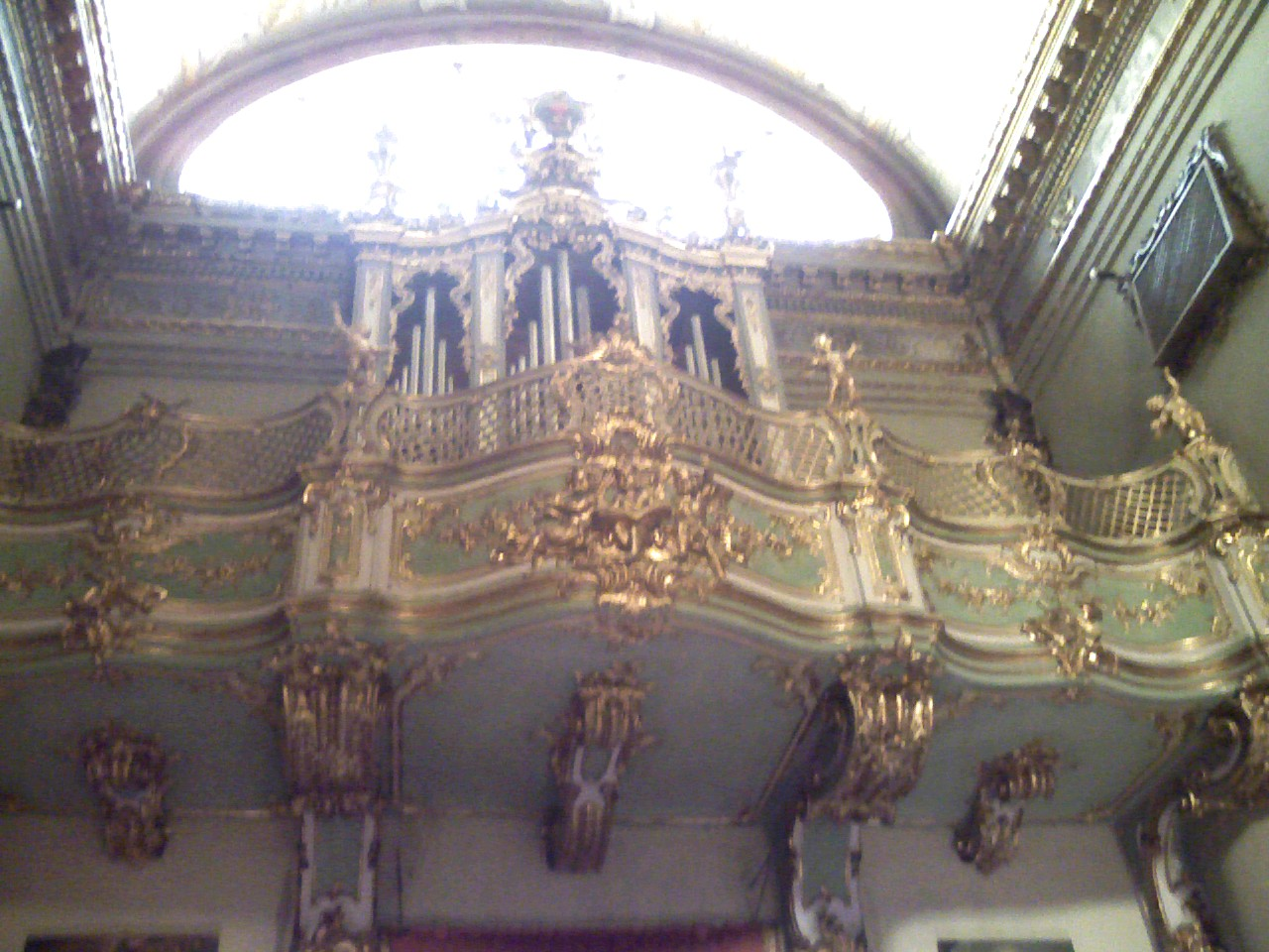 Organo dei fratelli Concone, Oratorio del Cristo Risorto, Savona (Italy)